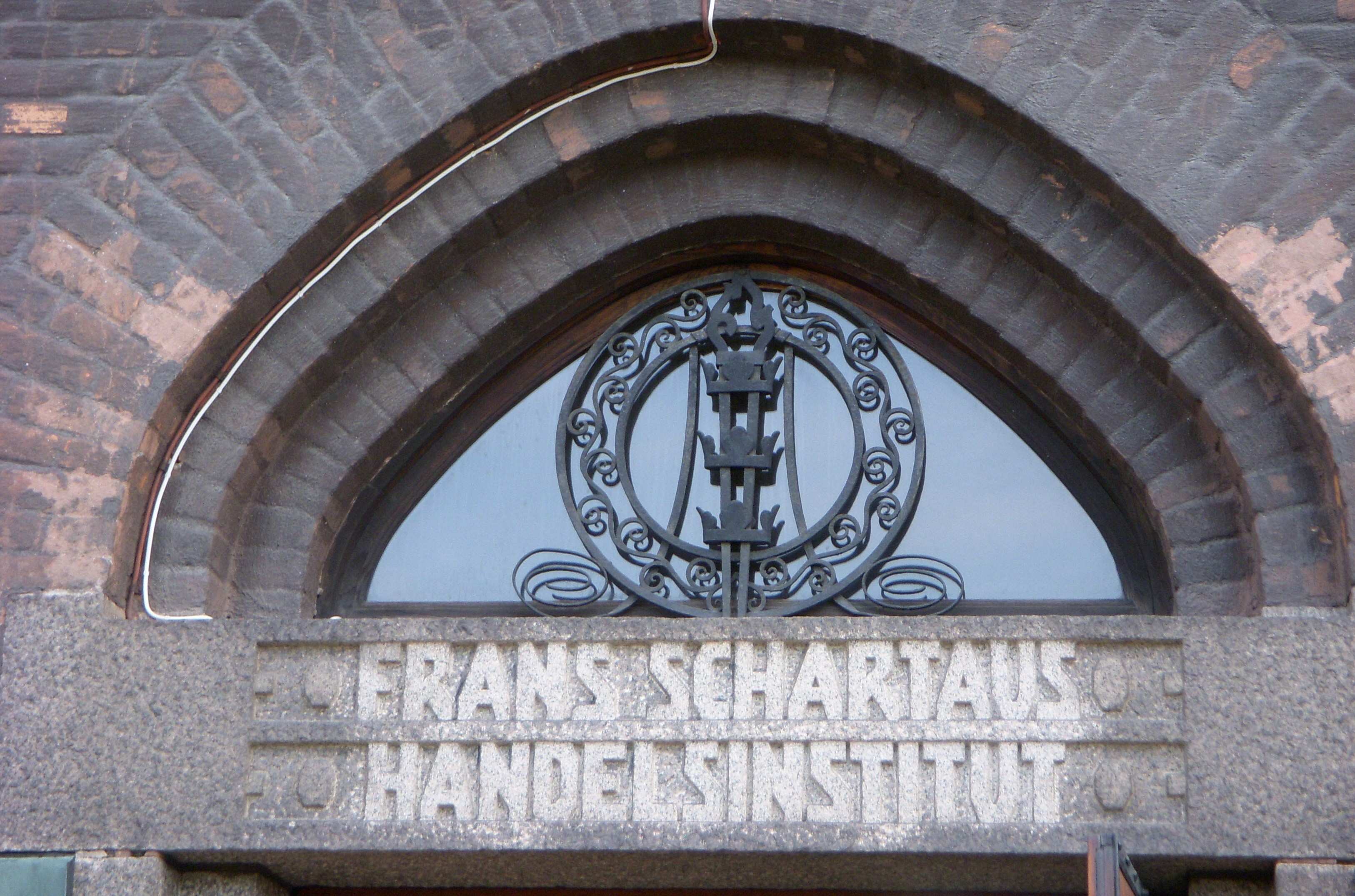 Frans Schartaus Handelsinstitut på Södermalm i Stockholm